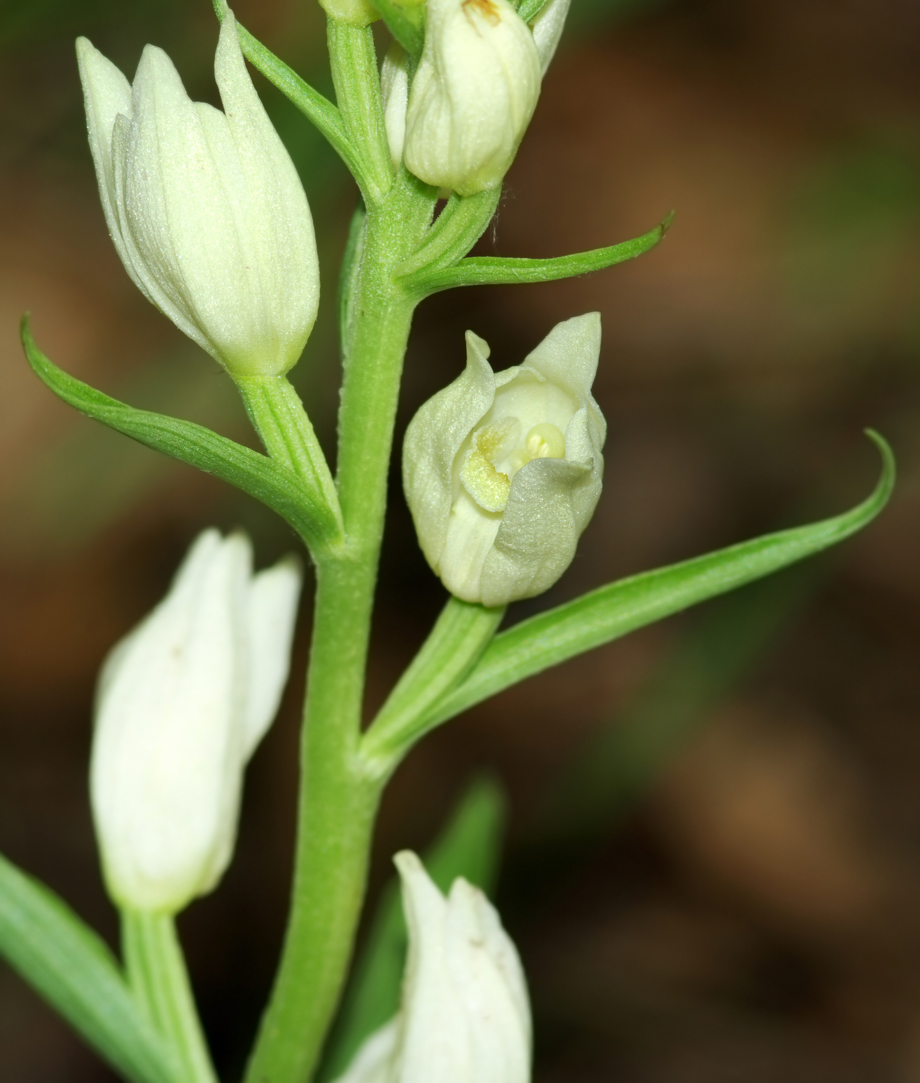 Buławnik wielkokwiatowy (Cephalanthera damasonium) / Bukowa Góra w Dąbrowie Górniczej